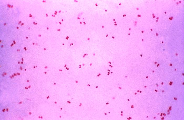 Neisseria gonorrhoeae in einer Gram-Färbung